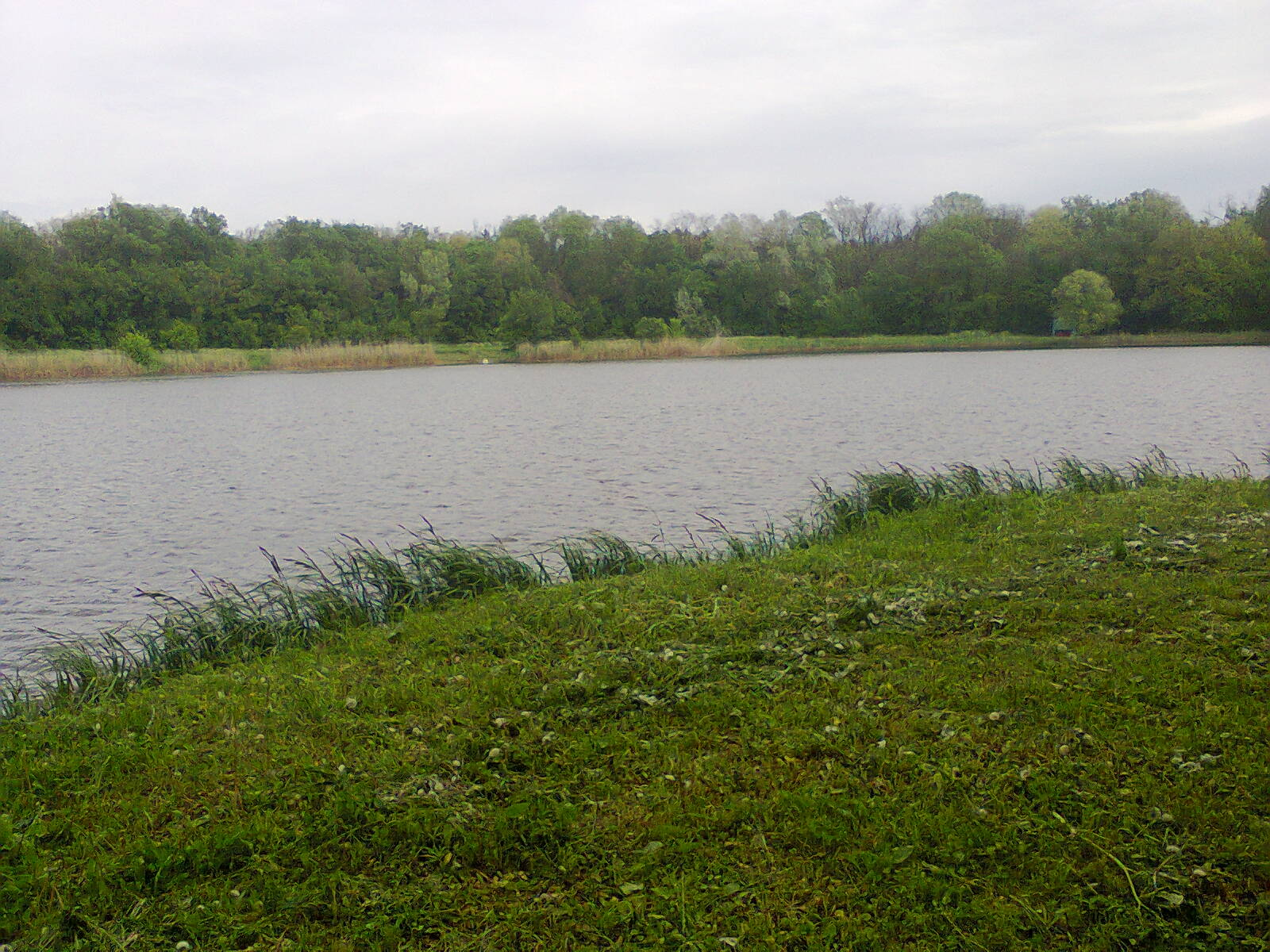 «Квітуча балка», Новгородківський р-н, смт Новгородка